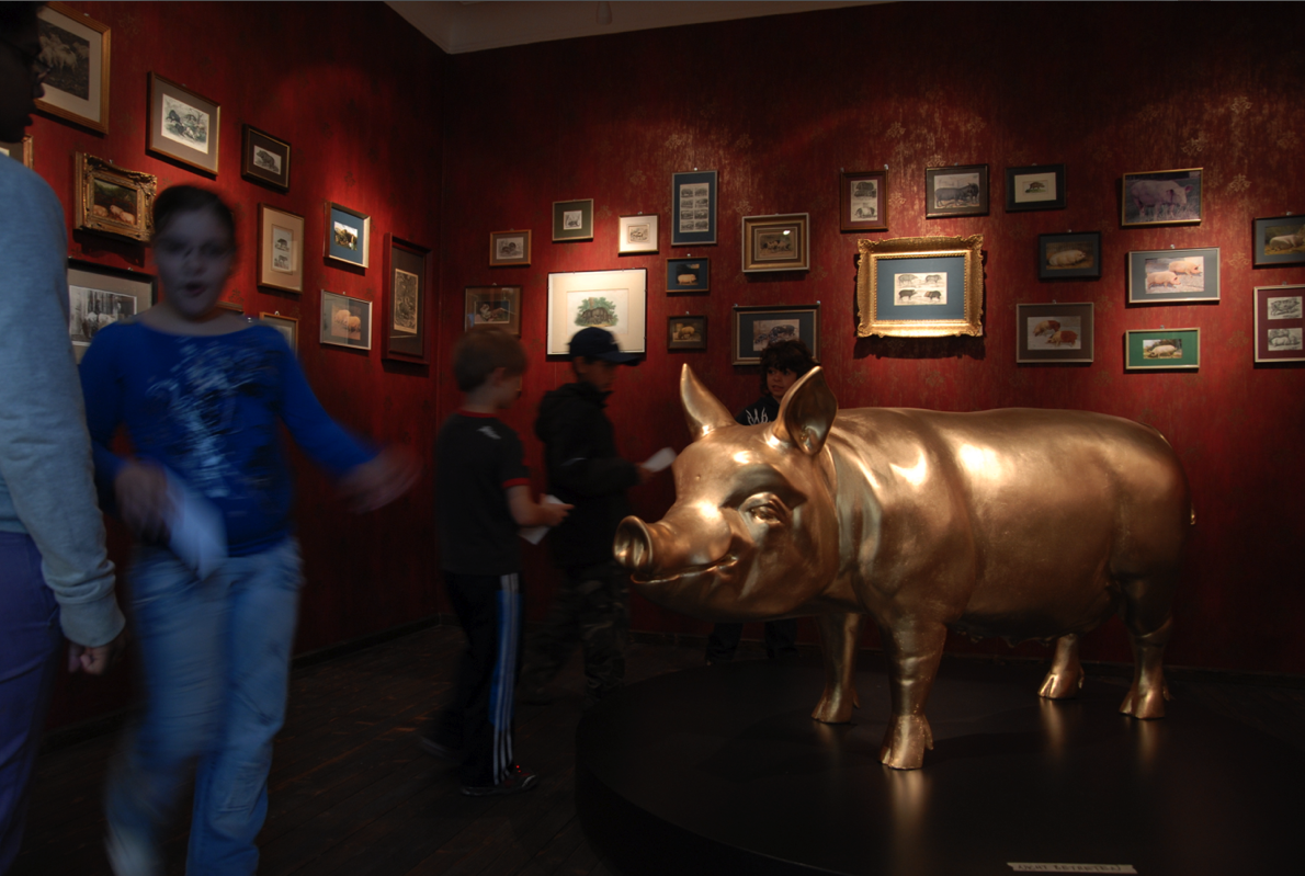 goldene schwein